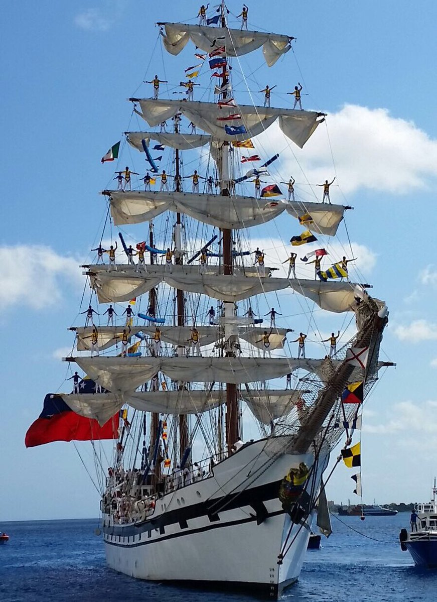 Los Guardiamarinas en su ultimo año académico efectúan pasantias a bordo del Buque Escuela AB. "SIMÓN BOLIVAR" (BE-11) con el fin de surcar aguas en el extranjero.